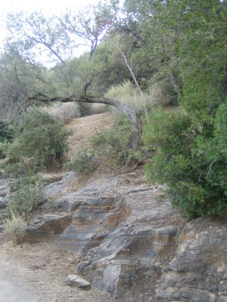 photo réalisée en août 2006 et offerte par Sadok GHARBI